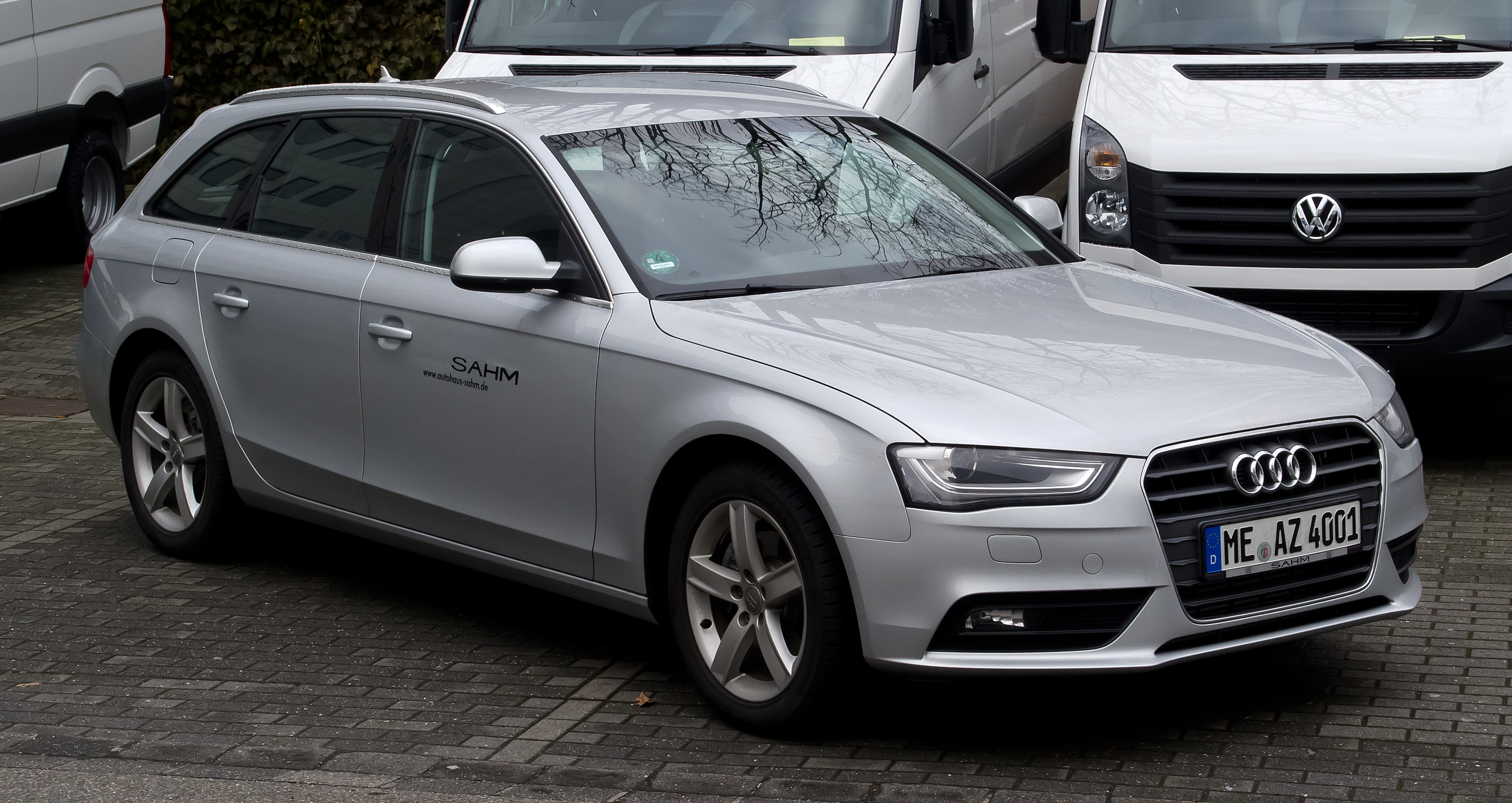 Audi A4 Avant 2.0 TDI (B8, Facelift)